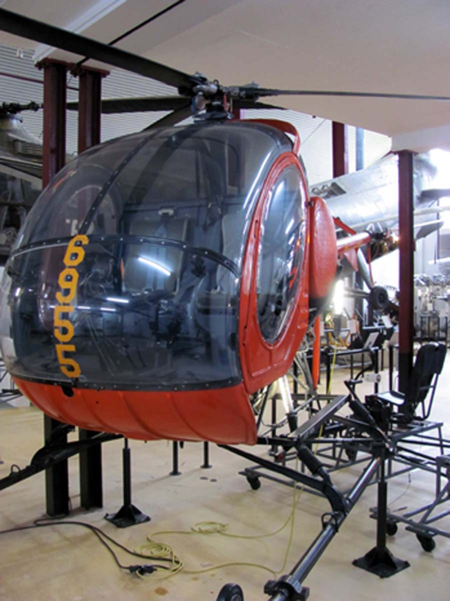 Hughes TH 55A im Hubschraubermuseum Bueckeburg